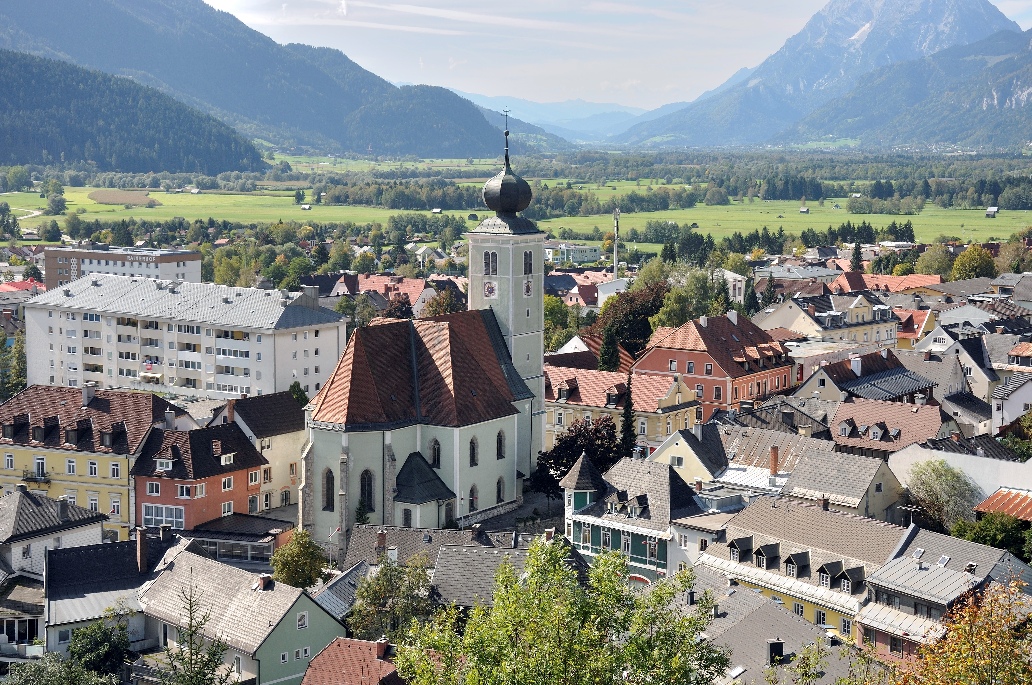 Kath. Pfarrkirche hl. Veit und ehem. Friedhofsfläche